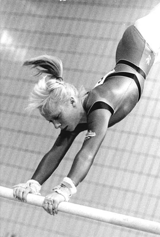 Antje Wilkenloh ADN-ZB Thieme 17.8.89 Karl-Marx-Stadt: DDR-Meisterschaften im Turnen-Nach dem Pflichtprogramm der Frauen setzte sich die Rostockerin Antje Wilkenloh (hier am Stufenbarren) erwartungsgemäß an die Spitze des zwölfköpfigen Teilnehmerfeldes.